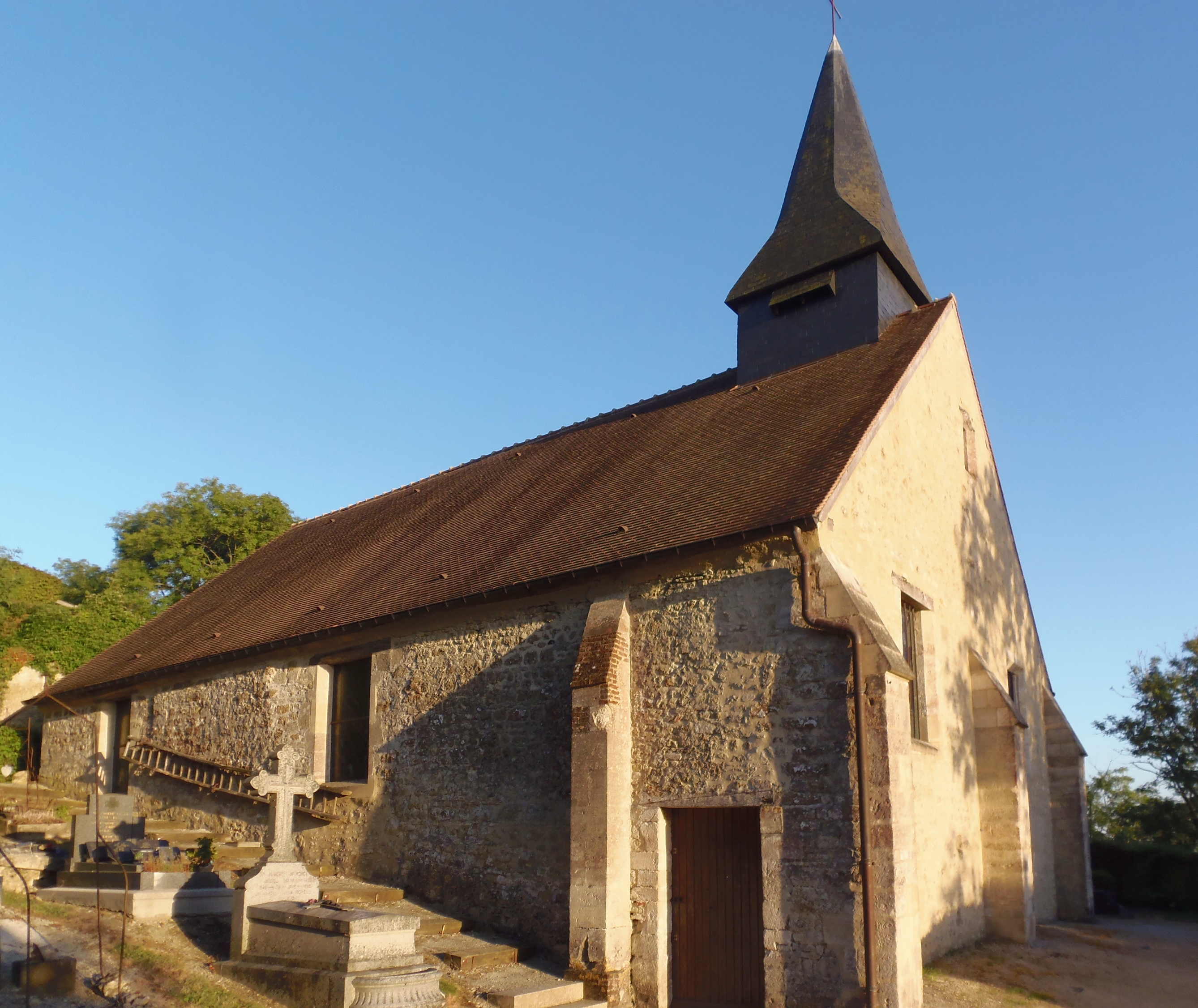 Coudehard (Normandie, France). L'église Saint-Pierre-et-Saint-Paul.